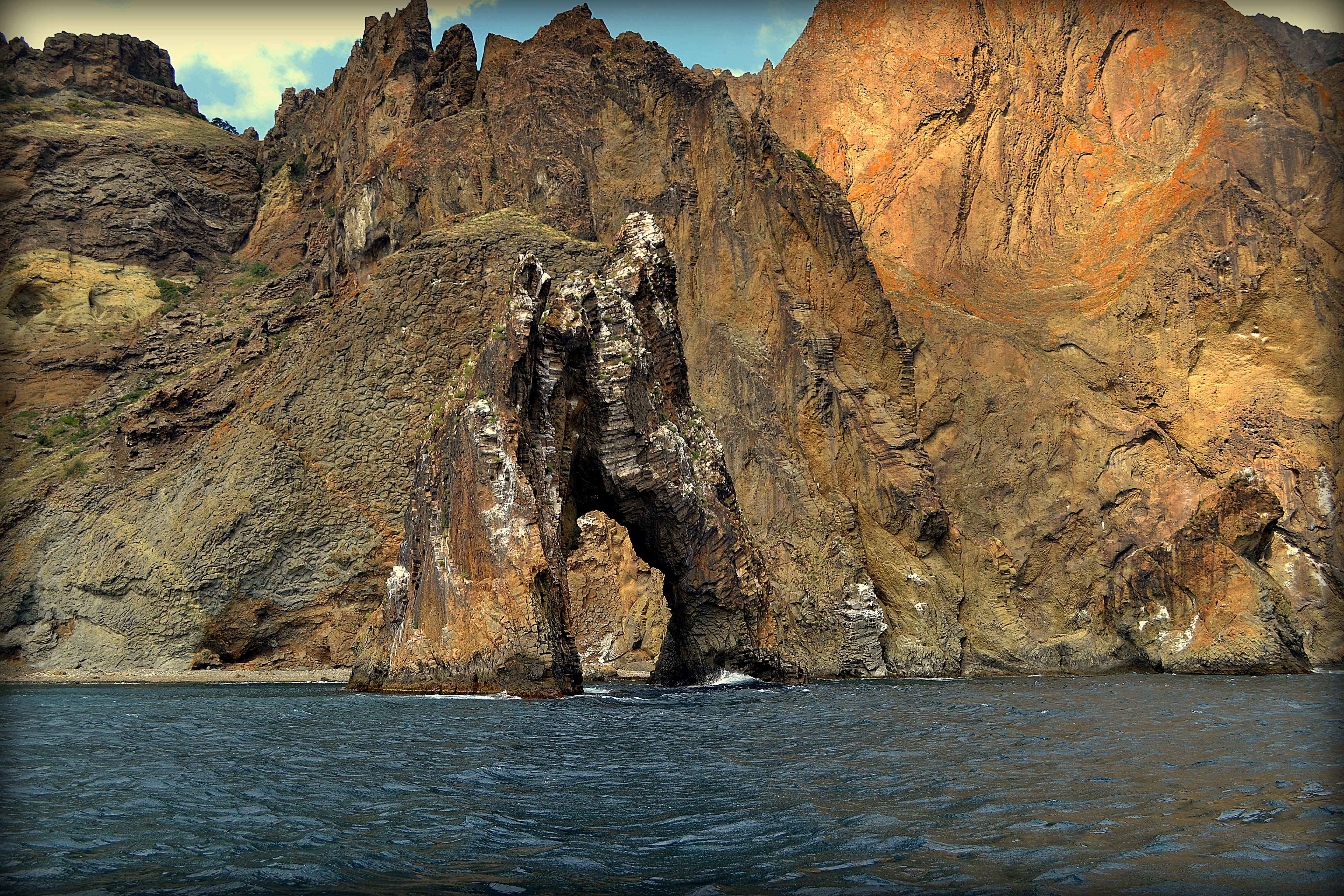 Карадазький ПЗ, 98188 м. Феодосія, сел. Курортне